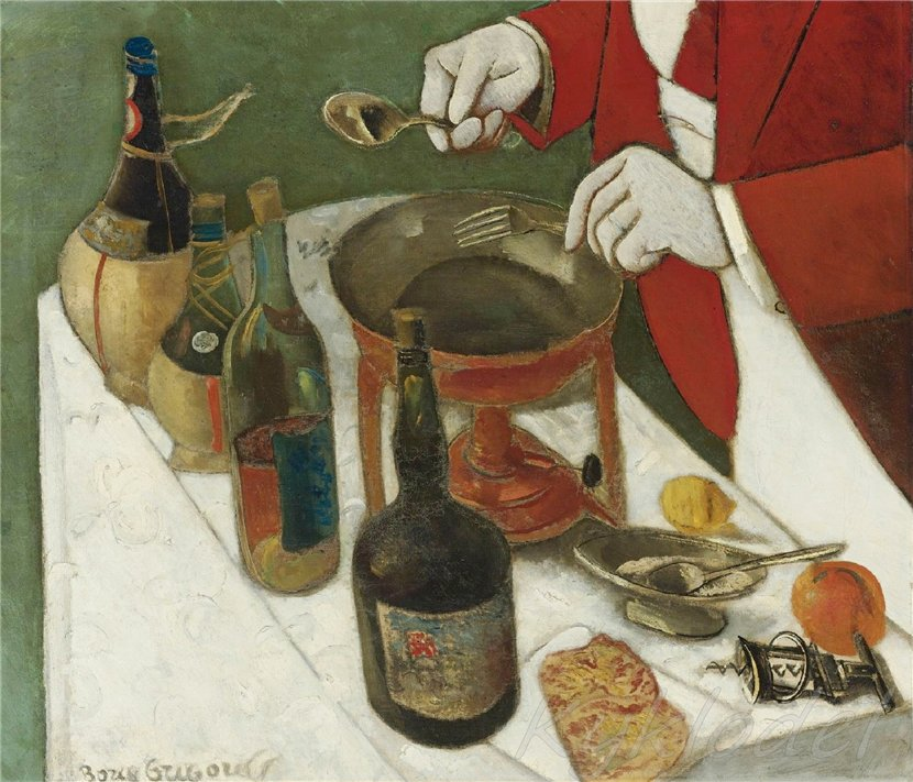 Борис Дмитриевич Григорьев (1886-1939) «Приготовление блинов» (диптих). Фонд "Виктория", Москва